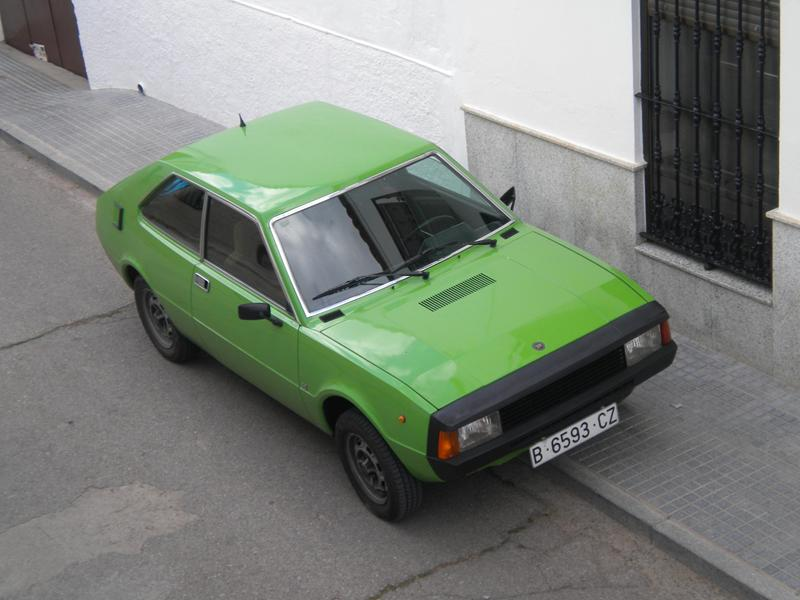 Foto original del autor.